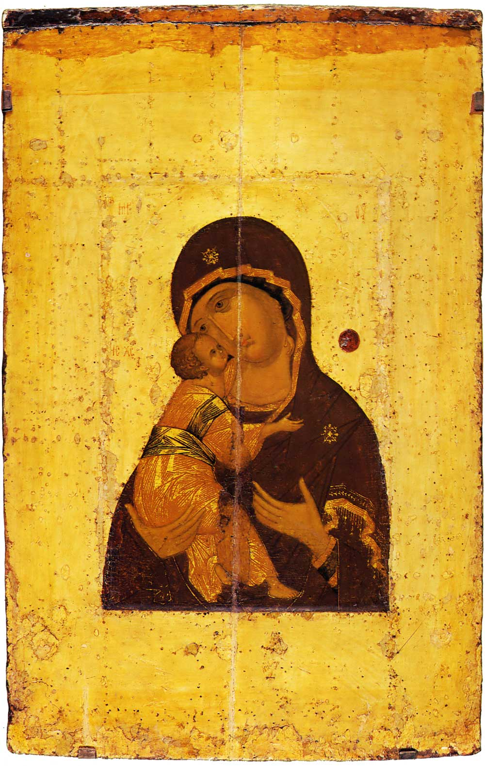 Богоматерь Владимирская (так называемая «Запасная») Школа или худ. центр: Москва Первая четверть XV в. Антонова 1966/2: 1395 г. Лазарев 2000/1: Первая четверть XV в. Христианские реликвии 2000: Первая четверть XV в. 102 × 68 см Успенский cобор Московского Кремля, Москва, Россия Инв. 3229 соб/ж-310 Одна из самых древних копий чудотворной иконы «Владимирской Богоматери» XII века, сделанная в размер оригинала. Памятник был приписан Андрею Рублеву В. И. Антоновой с датировкой — около 1395 года. В. Г. Брюсова [1998] также считает ее ранней работой Рублева, но датирует 1380-ми годами. Но, поскольку по мнению большинства специалистов качество исполнения иконы не особенно высоко, преобладает точка зрения, что Рублев непричастен к ее созданию, а сам памятник обычно датируется началом или первой четвертью XV века (см., например, [Лазарев 2000а]). В начале XVII века находилась у амвона против царских врат, позднее в алтаре в боковом иконостасе Петропавловского придела. Лазарев 2000/1 с. 368 ¦ 108. Богоматерь Владимирская Первая четверть XV века. 102×68. Успенский собор в Московском Кремле [3229 соб/ж-310]. Время поступления в Успенский собор остается неизвестным. Впервые упоминается в описи начала XVII века. Сохранность хорошая. Золотой фон утрачен, посередине идет трещина, заправленная новым левкасом. До 1904 года находилась под золотым окладом. В этой вольной копии с византийской иконы Владимирской Богоматери довольно сильно изменены пропорции головы и лица. с. 368 \